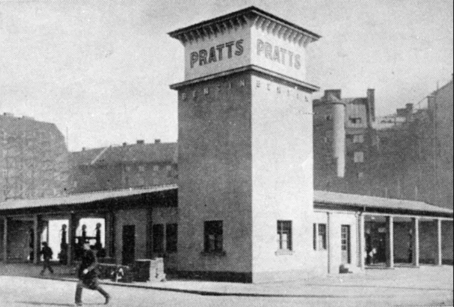 Pratts Birger Jarlsgatan / Kungstensgatan Stockholm, kv. Sälgen 4. Arkitekt: Sven Wranér